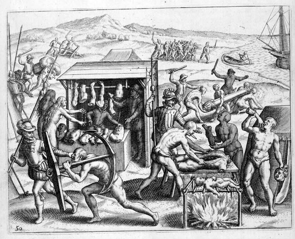 Narratio_Regionum_indicarum_per_Hispanos_Quosdam_devastatarum_verissima